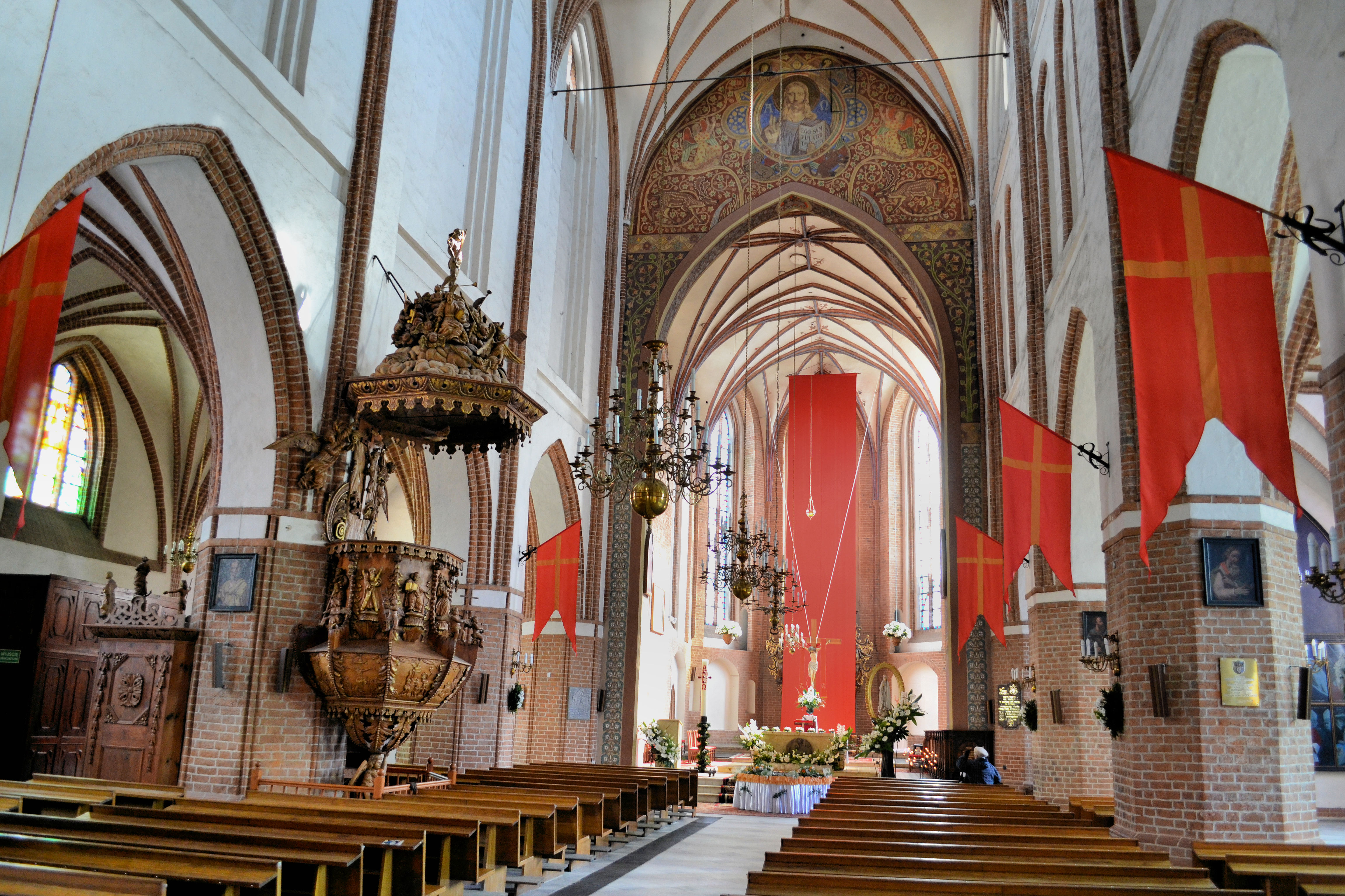 Kościół Matki Bożej Częstochowskiej w Darłowie